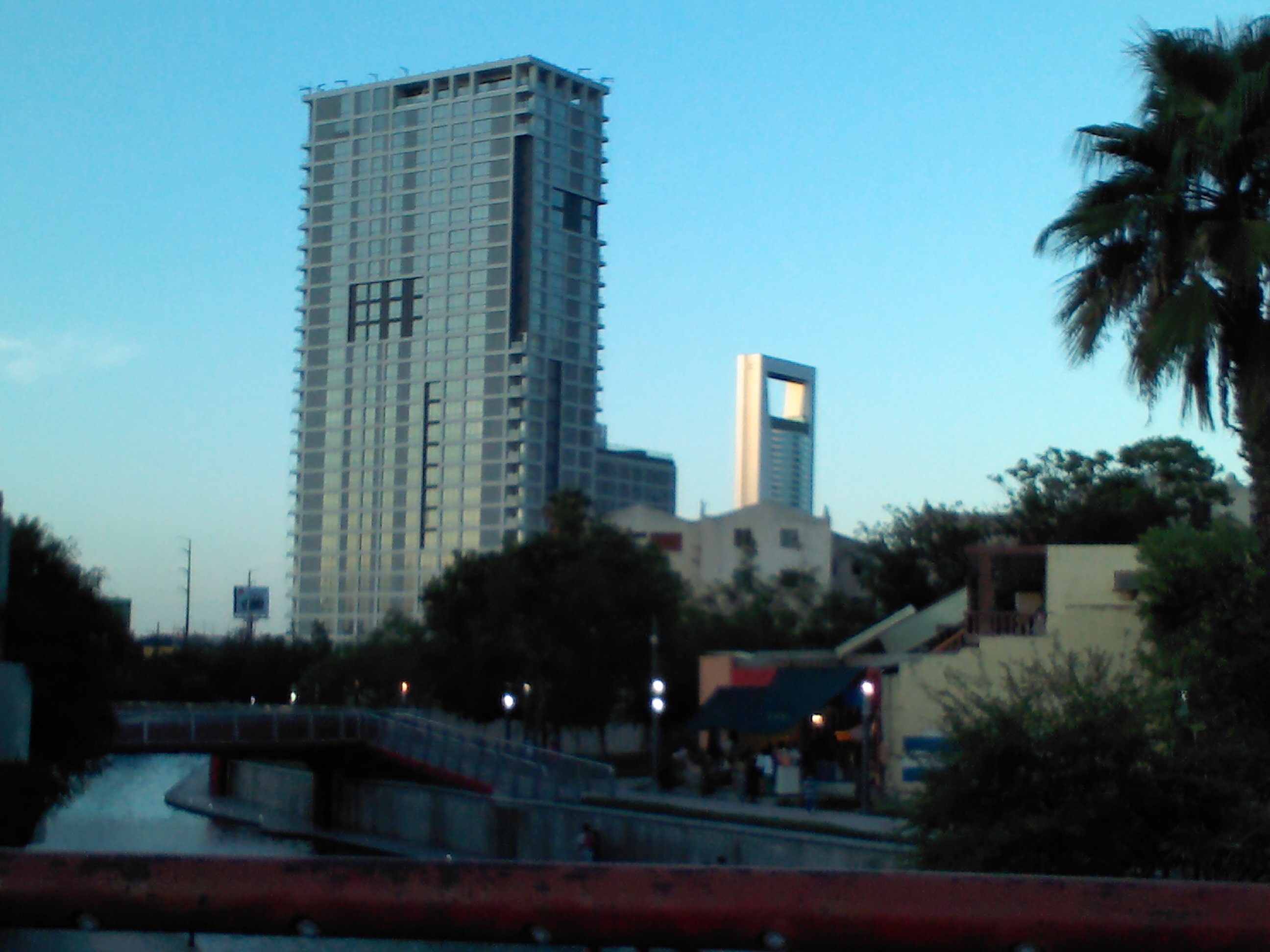 Vista desde Santa Lucia del edifico La Capital y la Torre Ciudadana.